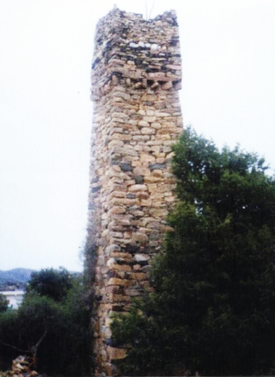 حصون بلاد قبيلة حوالة